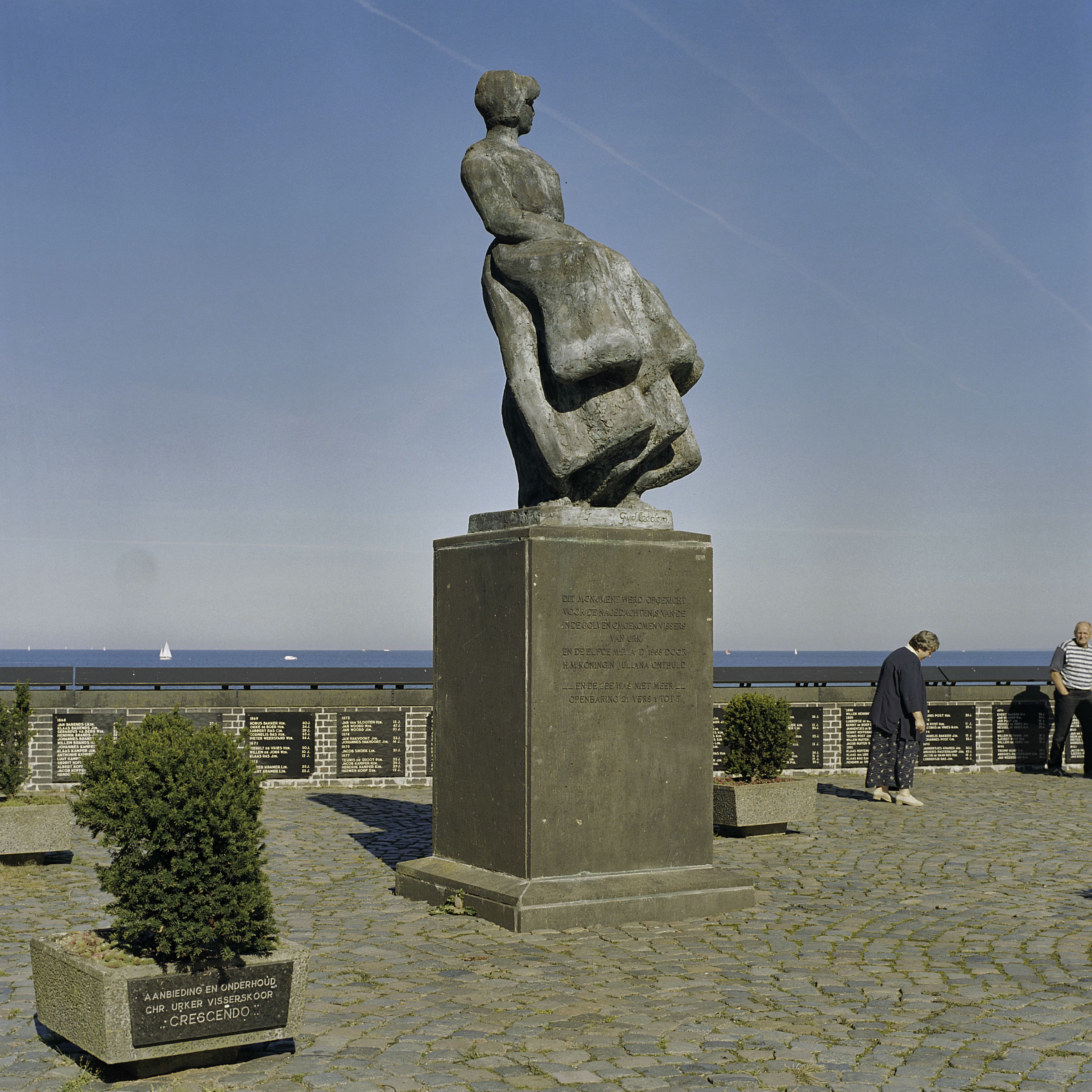 Vissersmonument: Zicht op bronzen beeld uitkijkend op de voormalige zee (opmerking: Gefotografeerd voor Monumenten In Nederland Flevoland)